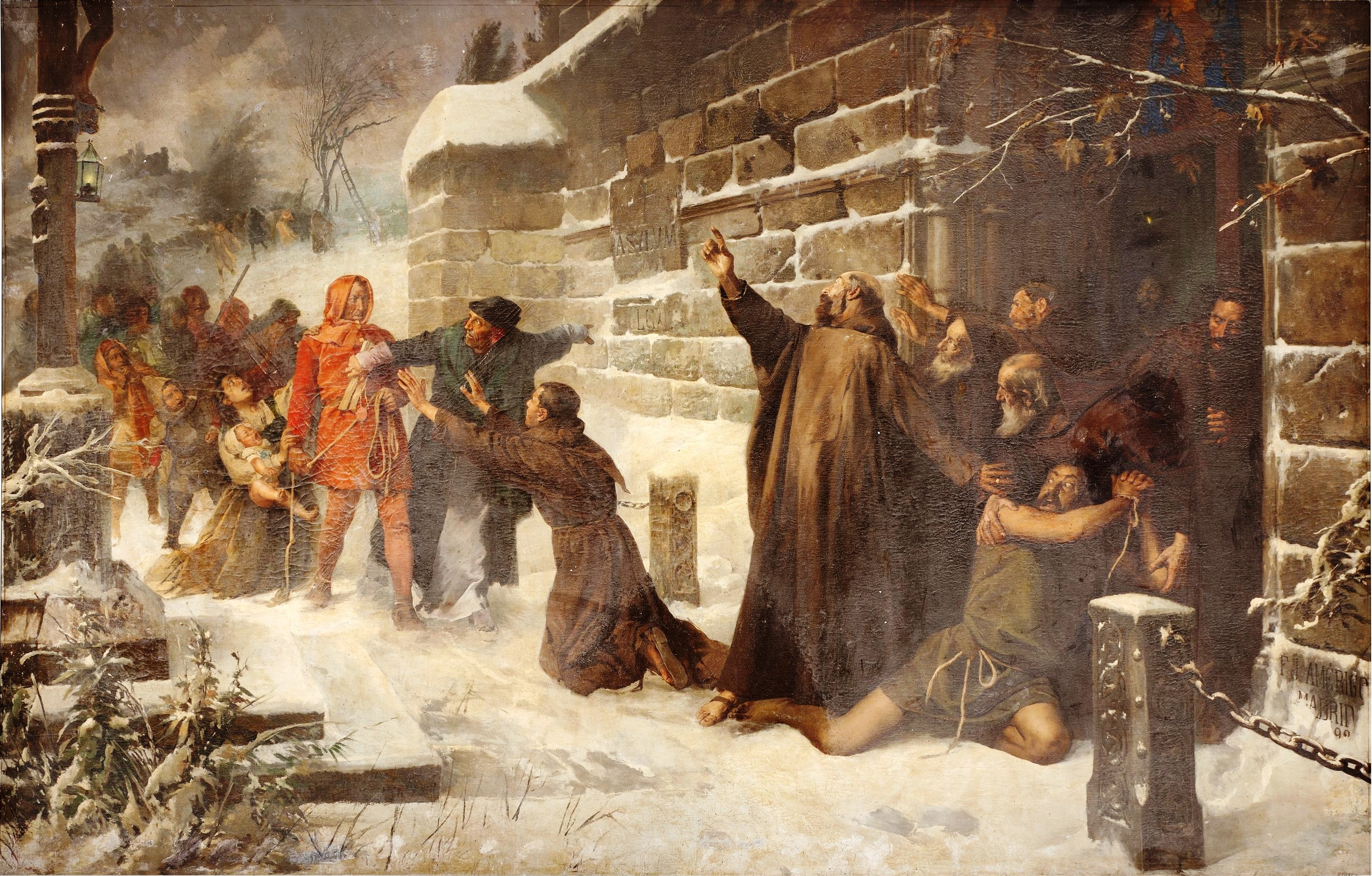 La obra representa a un individuo implorando el Derecho de asilo a las puertas de un convento de frailes y siendo perseguido por otros hombres, a quienes suplica la esposa del fugitivo, que lleva en brazos al pequeño hijo de ambos.